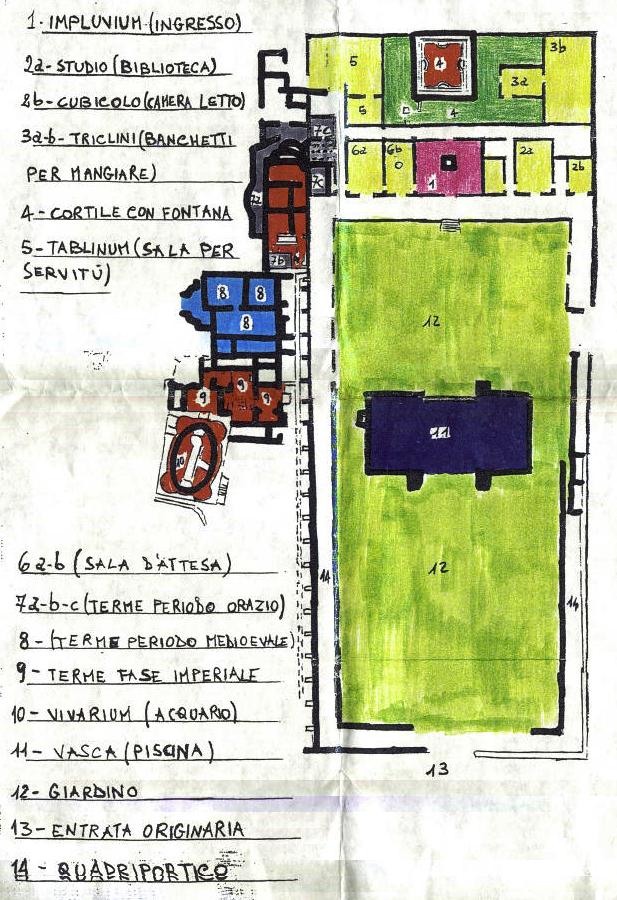 Grundriss Villa des Horaz (Licenza), nach Sabinis, S. 4, selbsterstellte Zeichnung, Benutzer s.u.